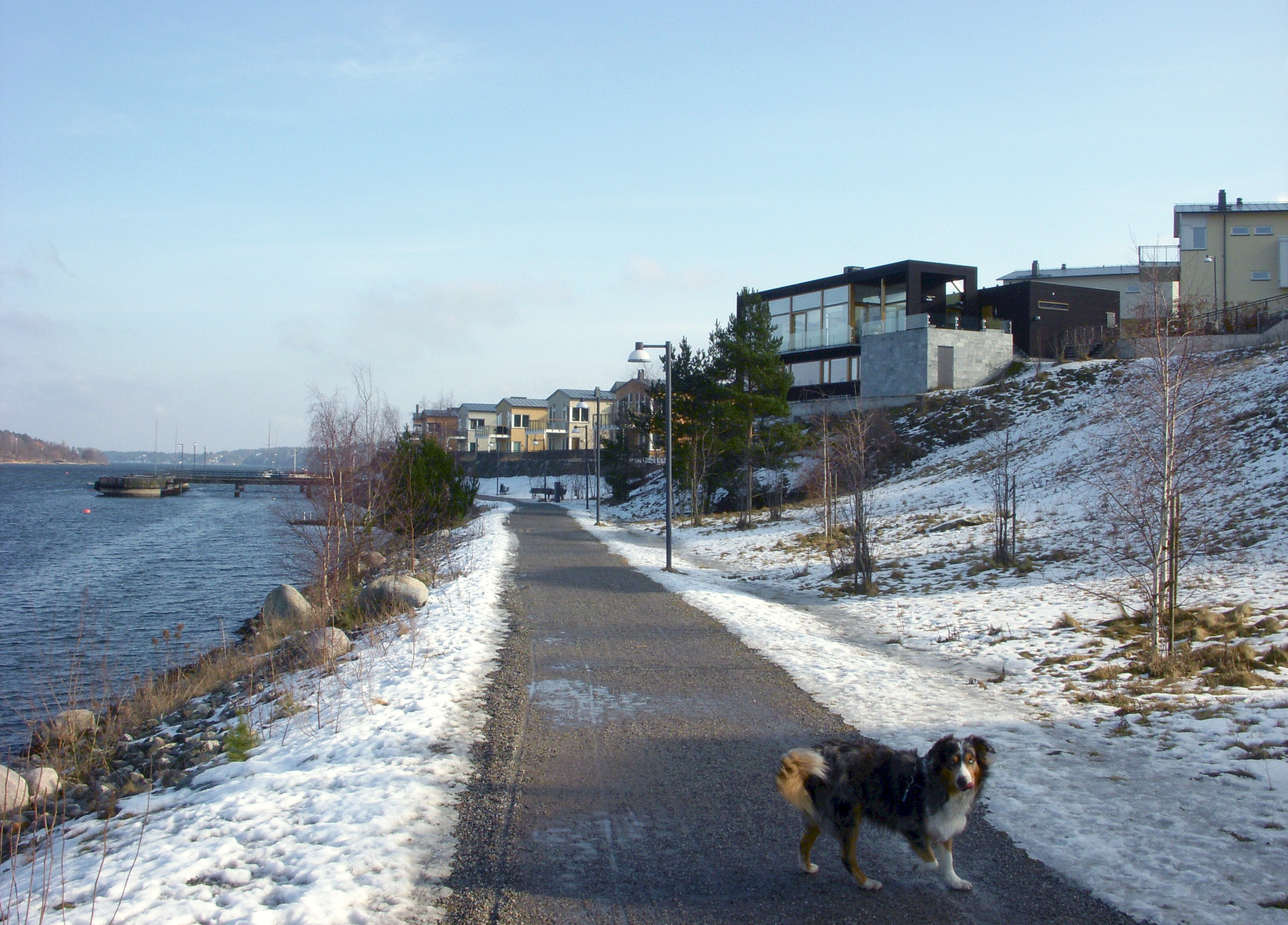 Bostadsområdet "Gåshaga" på Lidingö